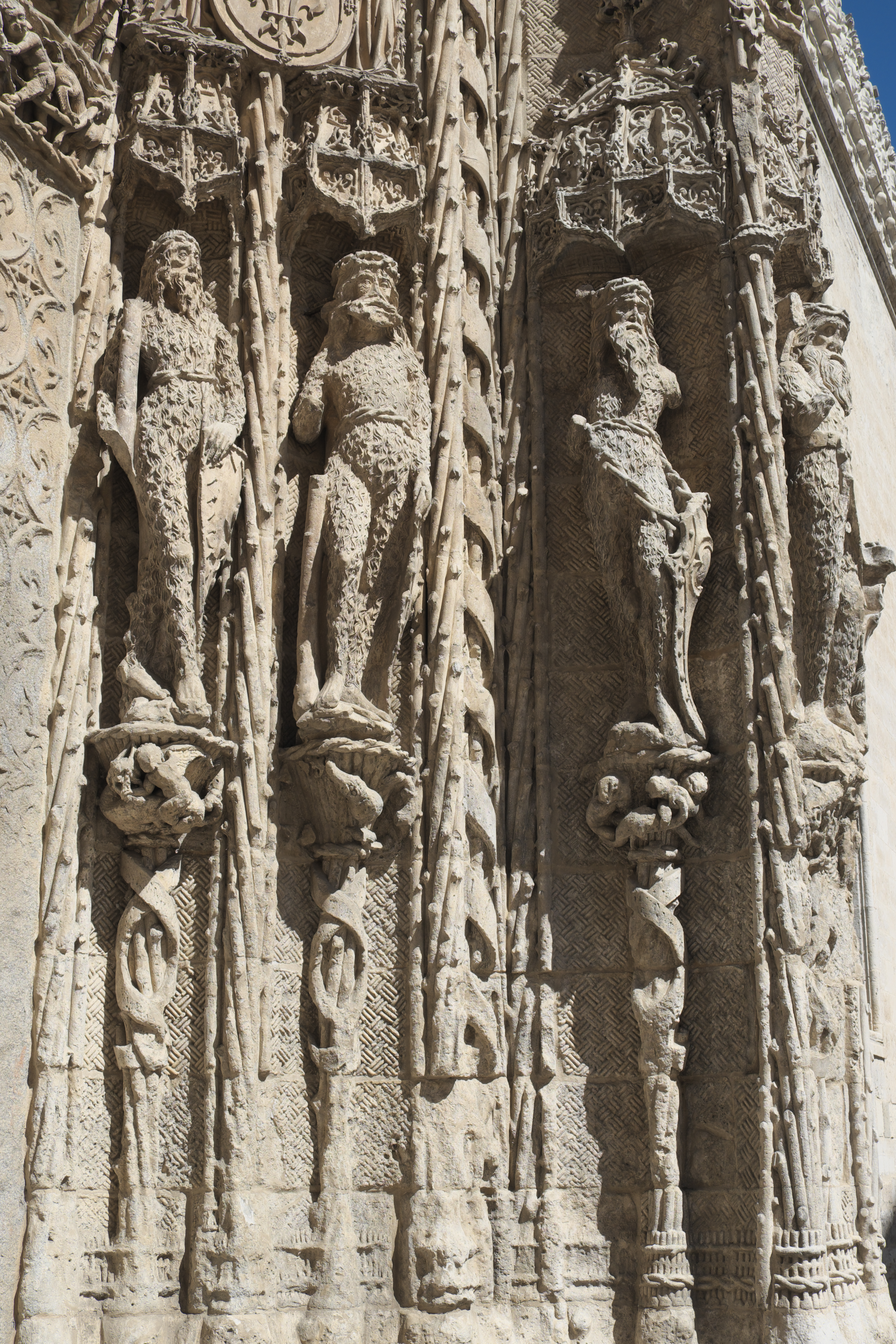 Fassade des Colegio de San Gregorio, heute Museo Nacional de Escultura, in Valladolid(Kastilien und León/Spanien), Figuren am Portal